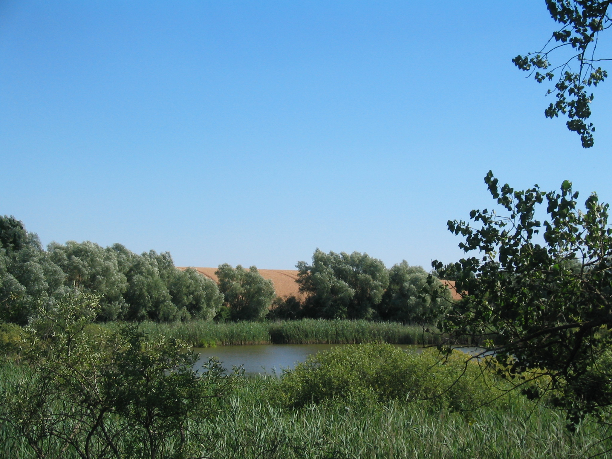 Nordkoppelsee bei Grünow